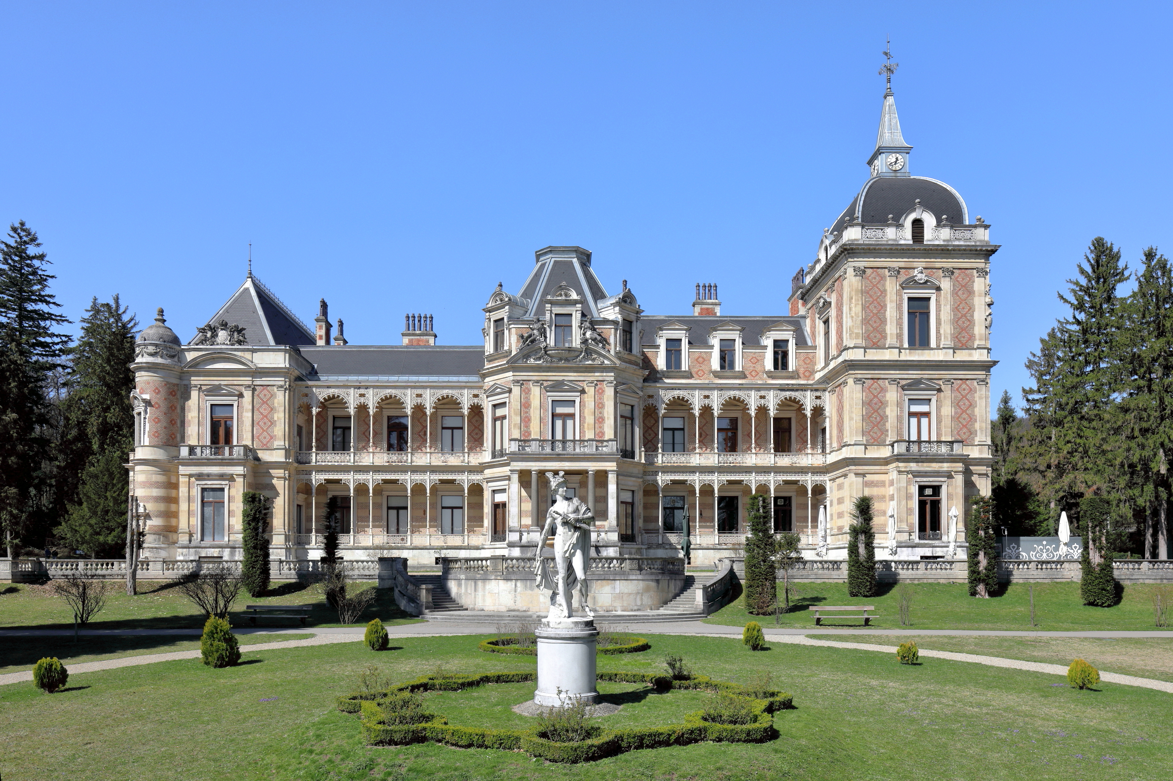 Südostansicht der Hermesvilla im 13. Wiener Bezirk Hietzing.Die Landvilla in Formen der französischen und italienischen Renaissance wurde von 1882 bis 1886 nach Plänen des ArchitektenCarl Freiher von Hasenauer gebaut. Errichten ließ sie Kaiser Franz Josephs I. für seine Frau. Der Projektname war „Villa Waldruh“. Später erfolgte die Umbenennung nach der Hermesstatute (datiert mit 1888), die im Garten aufgestellt ist und ein Werk des Berliner Bildhauers Ernst Herter ist.